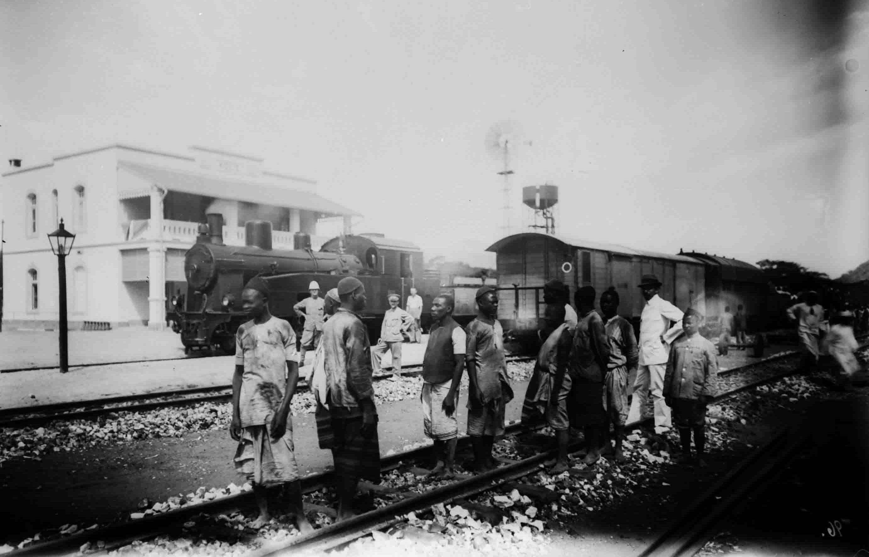 Ostafrikanische Eisenbahngesellschaft - Kidete Standort: StuUB Bildnummer: 012-1072-17 CD-Code: CD/3317/2014/0976/3317_2014_0976_0086 Text auf dem Bild: 96. Text auf der Hülle: Ostafrikanische Eisenbahngesellschaft 96. / Kidete Format Bildträger: 13x18 formale Bemerkung: Entstehungsjahr: Entstehungsjahr Vorlage: Photograph: Region: DOA - Tansania - Kidete Völker: Afrikaner - Europäer Sachgruppe: Verkehr - Landverkehr - Eisenbahn - Bahnstation - Verkehr - Landverkehr - Eisenbahn - Lokomotive - Verkehr - Landverkehr - Eisenbahn - Eisenbahnwagen - Bevölkerung - Personengruppe - Passagiere Schlagwort: Bahnstation - Lokomotive - Eisenbahnwagen - Passagiere